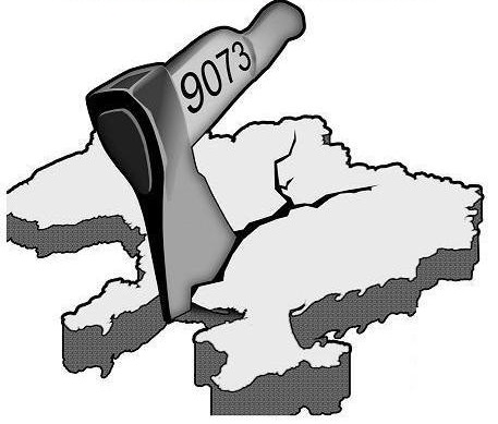 Логотип кампанії «Помста за розкол країни». Зображення, розроблене активістом ГР «Відсіч».